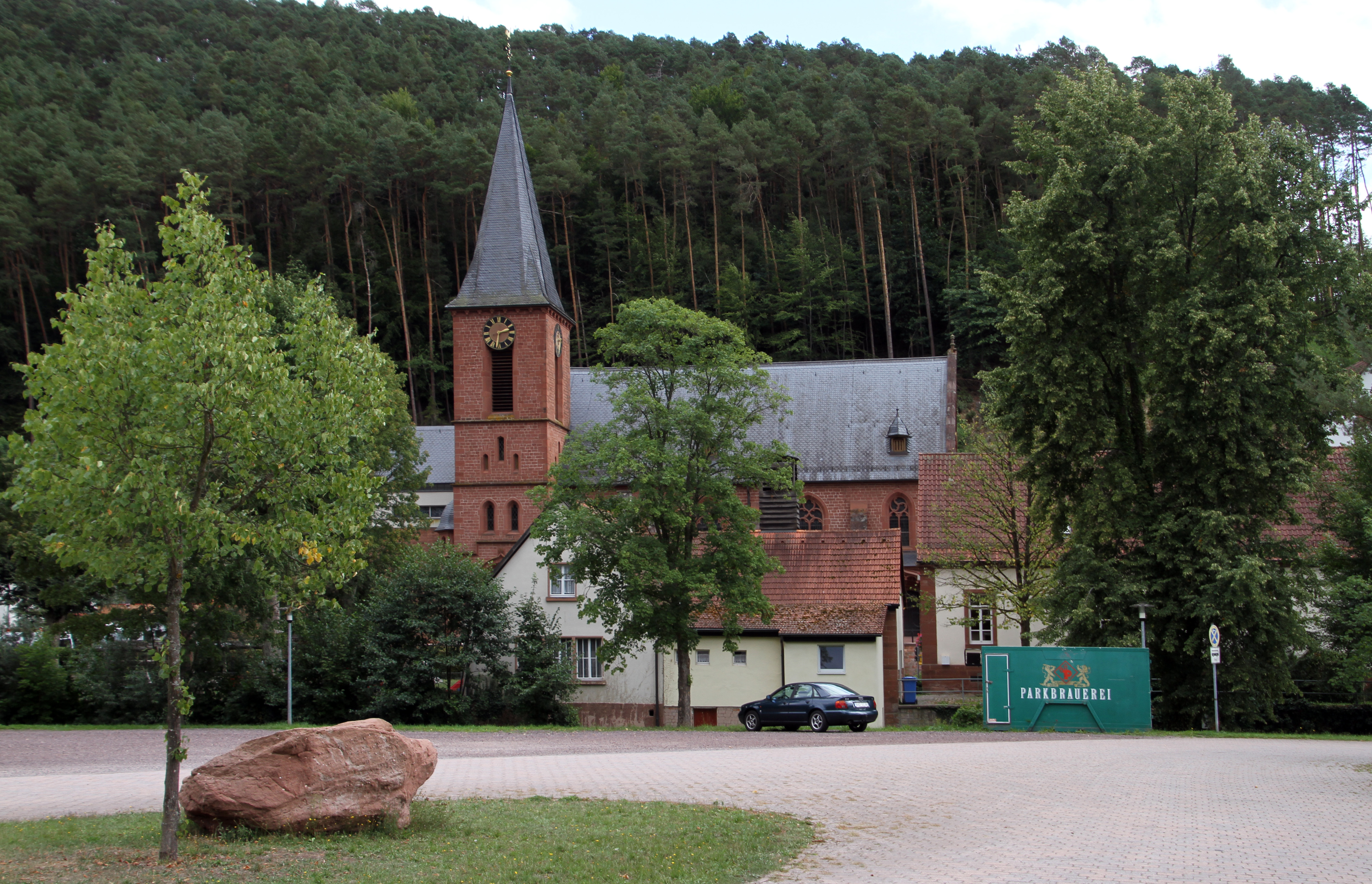 Erfweiler, Winterbergstraße 58; Katholische Kirche St. Wolfgang; neugotischer Saalbau, 1900, Architekt Wilhelm Schulte I., Neustadt an der Weinstraße.